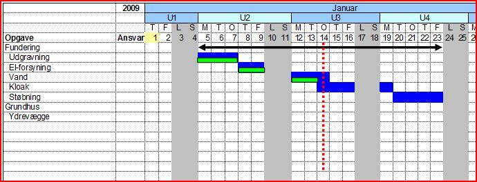 Eksempel på Gantt-skema